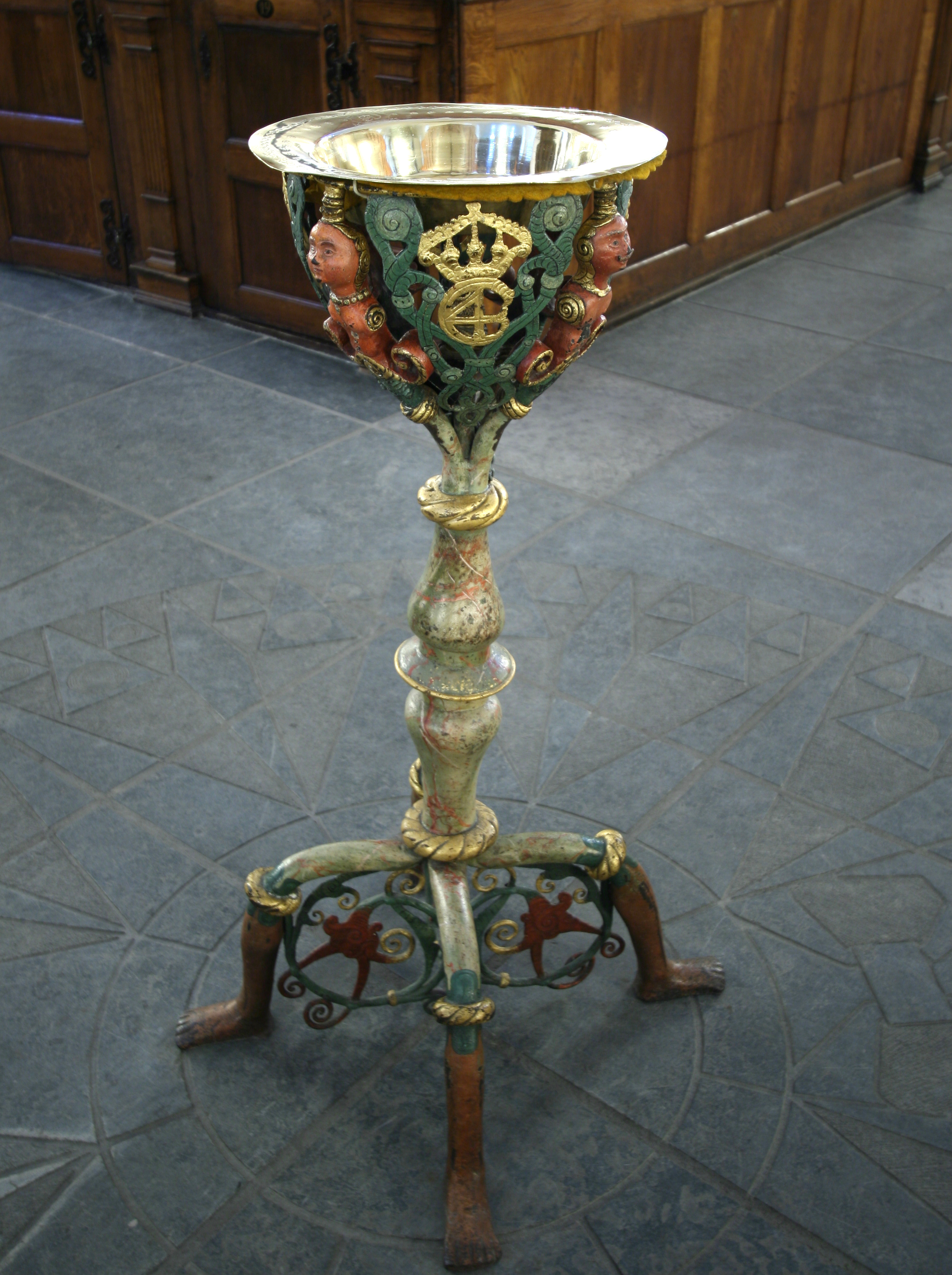 Holmens Kirke, Copenhagen, Denmark . Den gamle smedejerns døbefont.